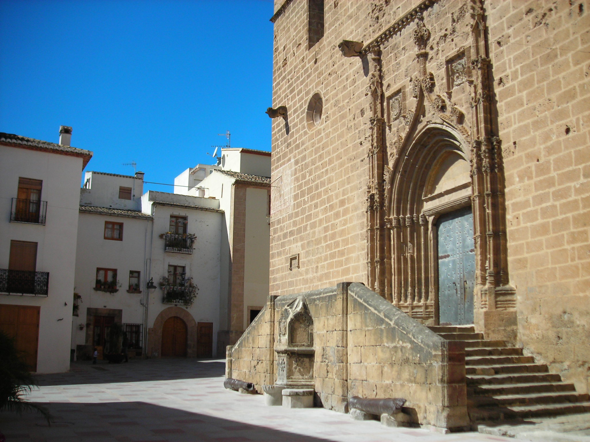 Fachada lateral de la Iglesia-Fortaleza de Sant Bertomeu (Xàbia, Alicante)